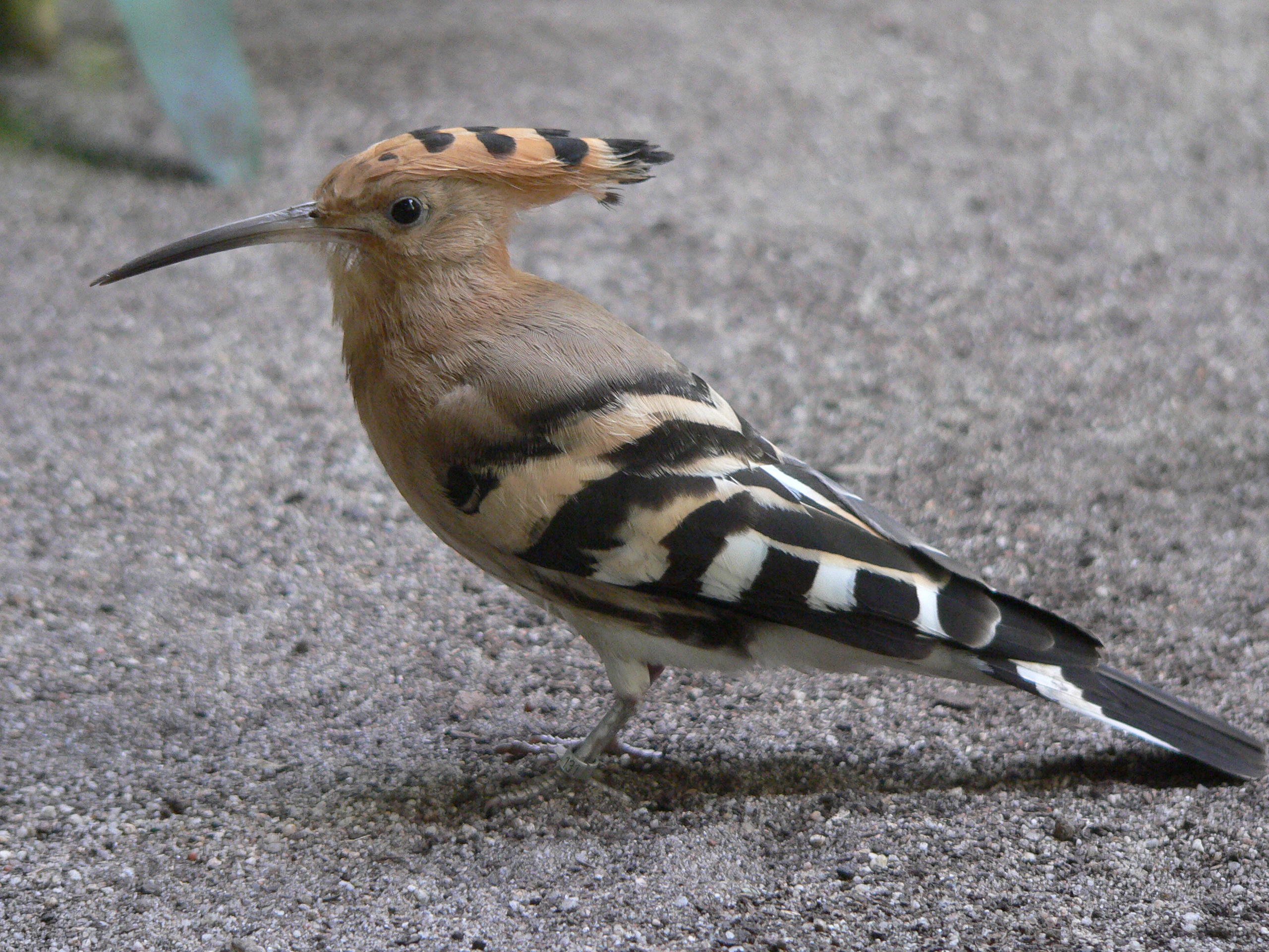 Wiedehopf, Upupa epops